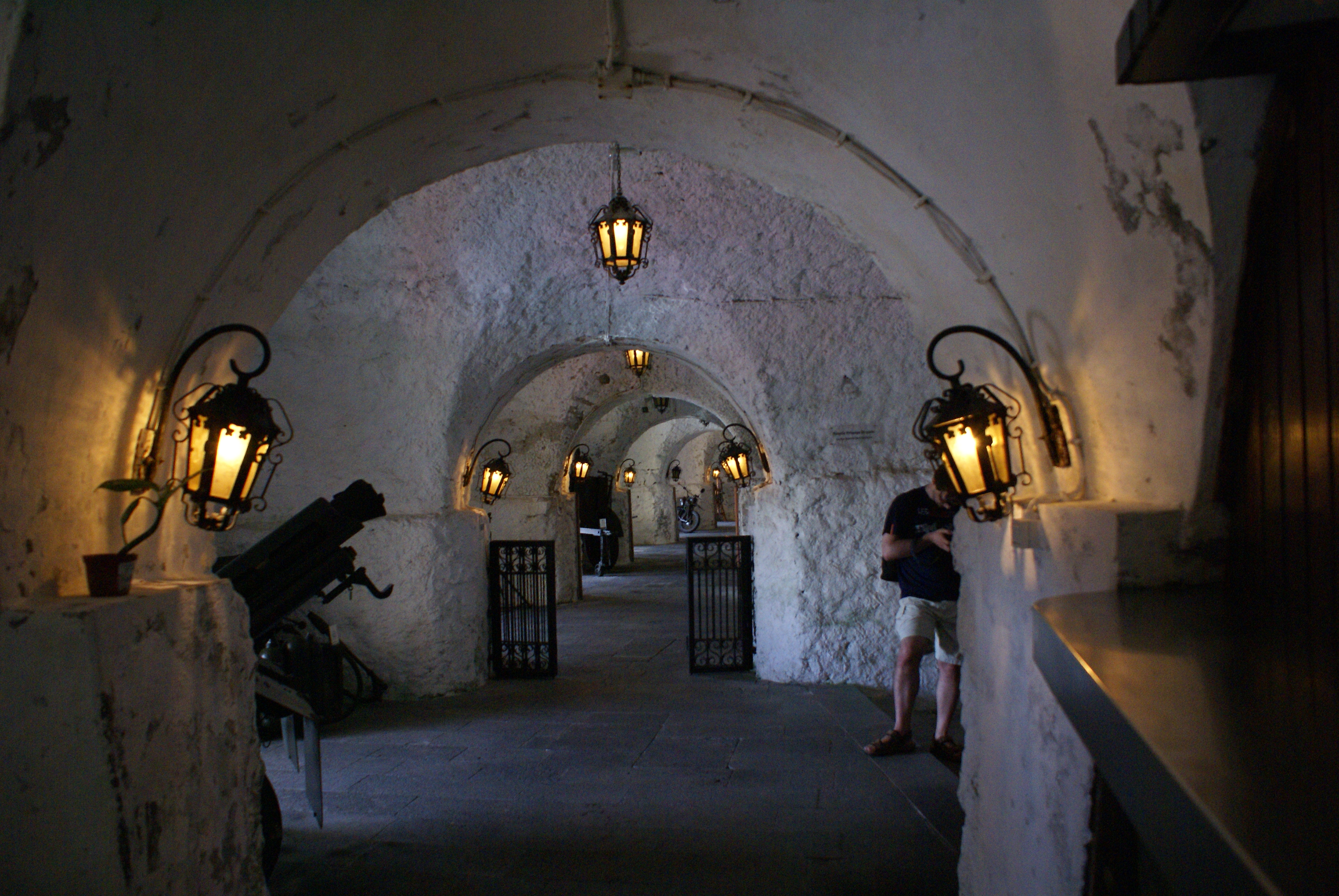 Forte de São Brás, arcadas, Ponta Delgada, ilha de São Miguel, Açores